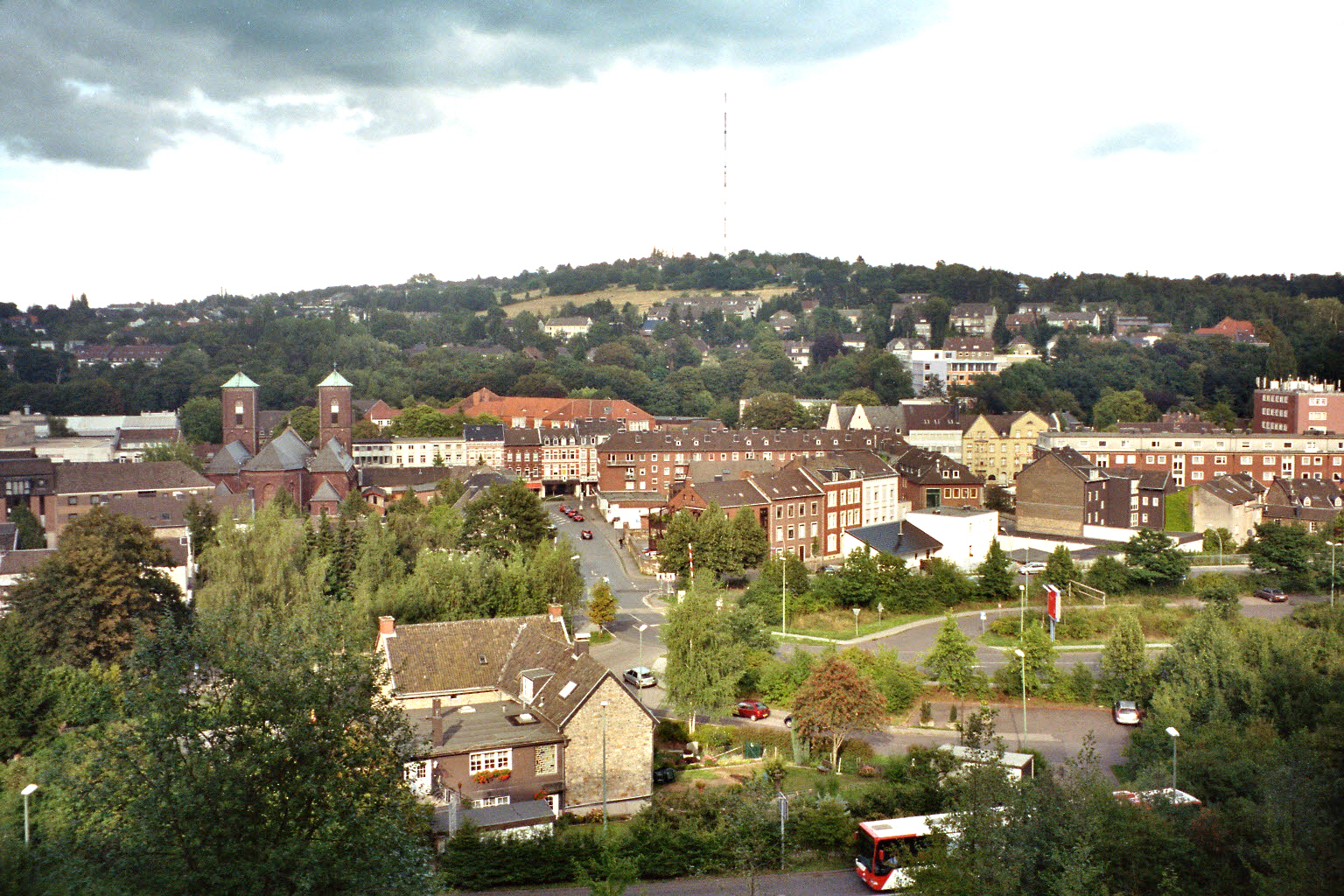 Blick_vom_Fettberg_auf_die_Stadtteile_Mühle_und_Donnerberg_mit_dem_Sender